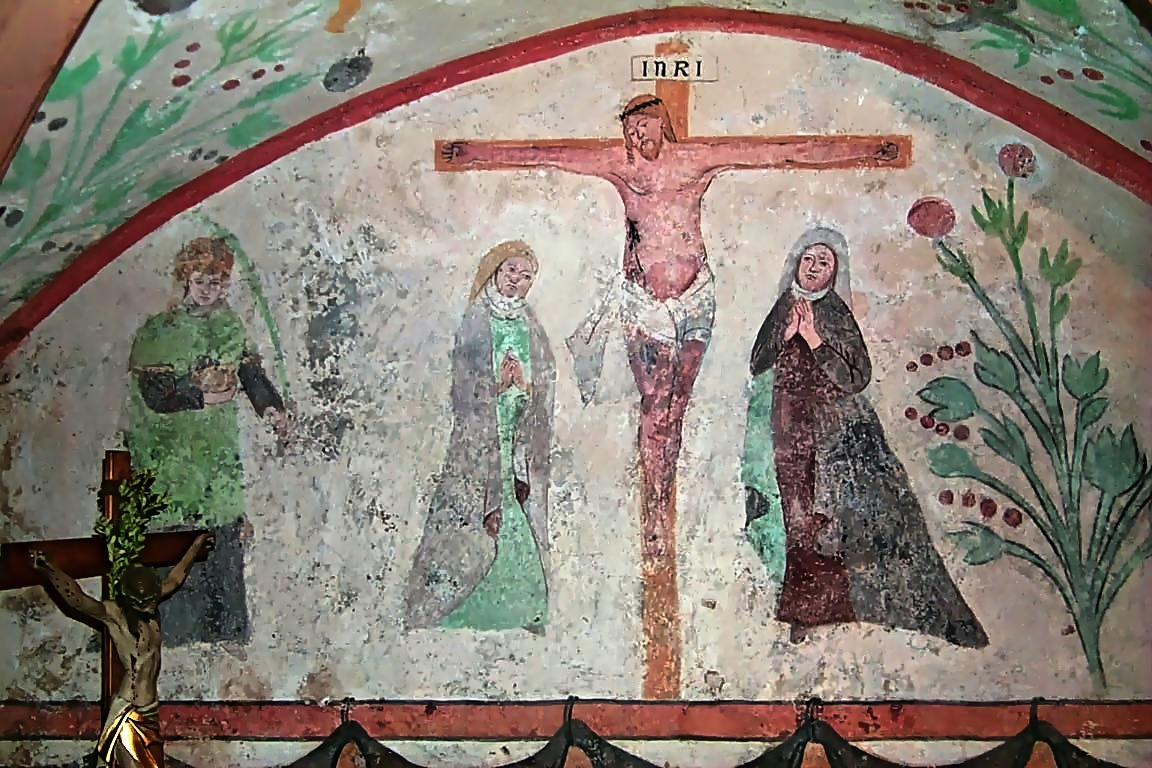 St. Stefan und Rochus, Renaissancefressken in der Krypta